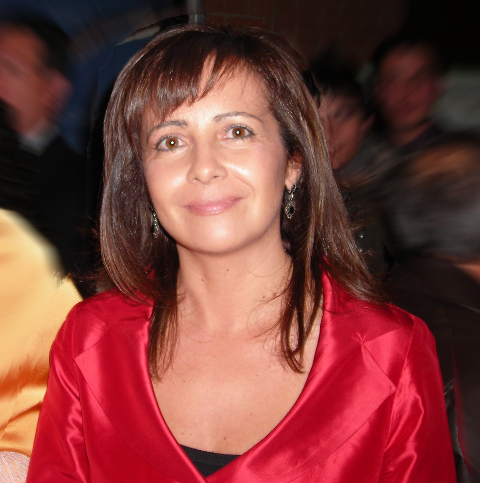 Carmen Oliver. Foto realizada en el Paraninfo de la Universidad de Castilla la Mancha, sede de Albacete.